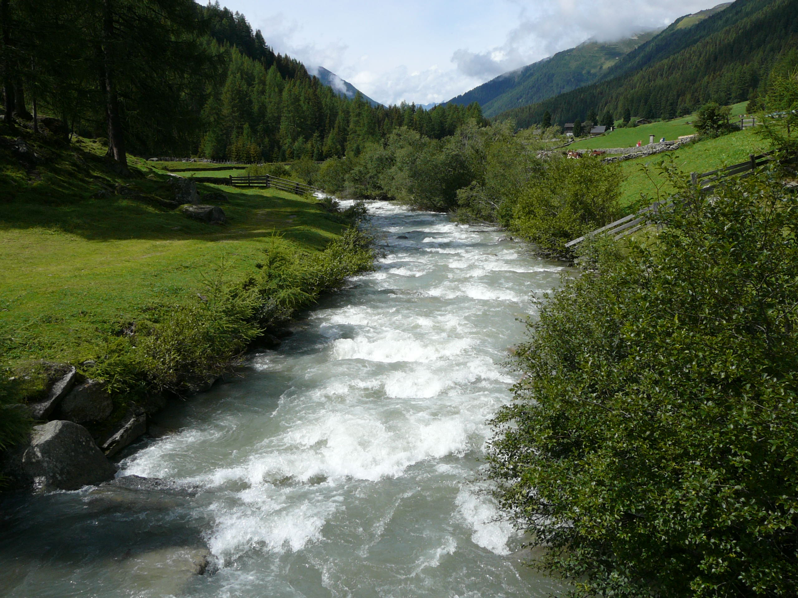 Aurino a Predoi